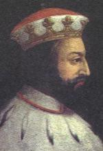 Dipinto del doge Giorgio Adorno